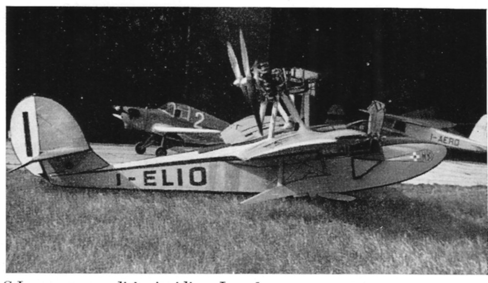 Aeroclub sconosciuto - 1963